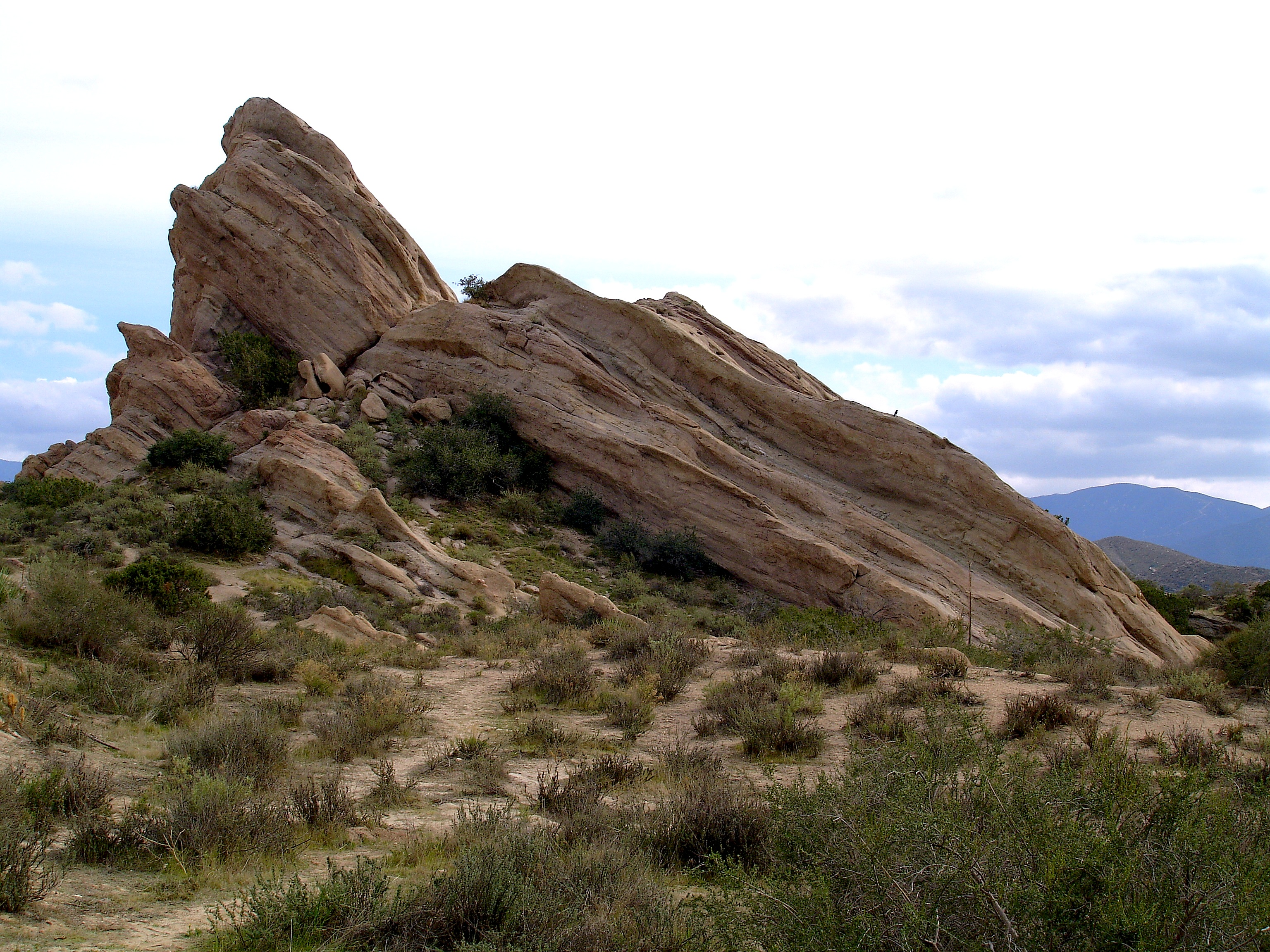 Vasquez Rocks, CA